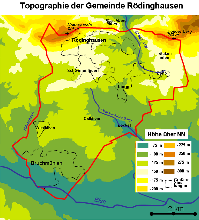 Topographie der Gemeinde Rödinghausen